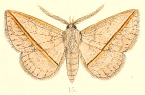 Ugia transversa (Moore, 1882) (Iluza)